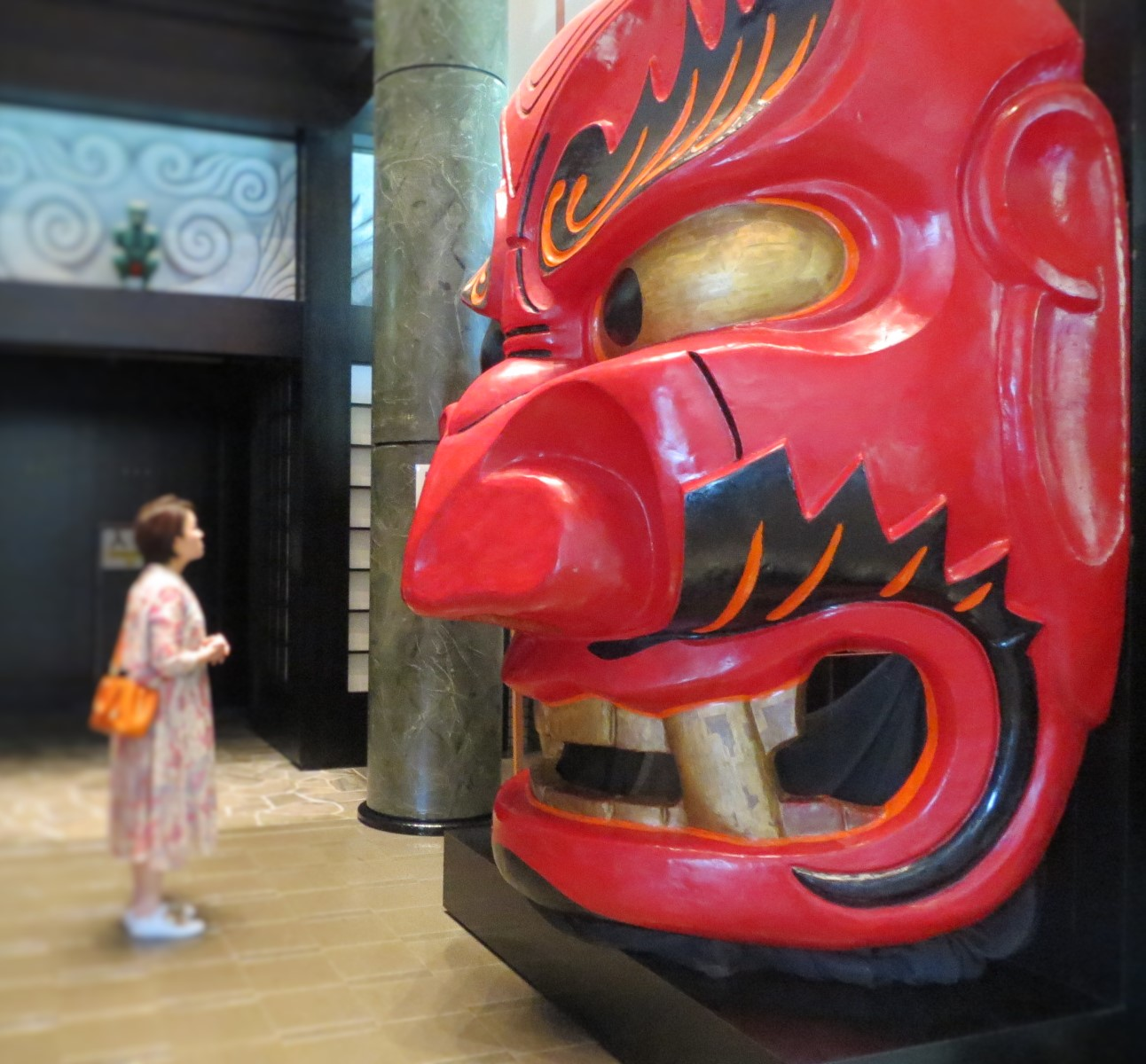 鬼の館内にある巨大鬼面